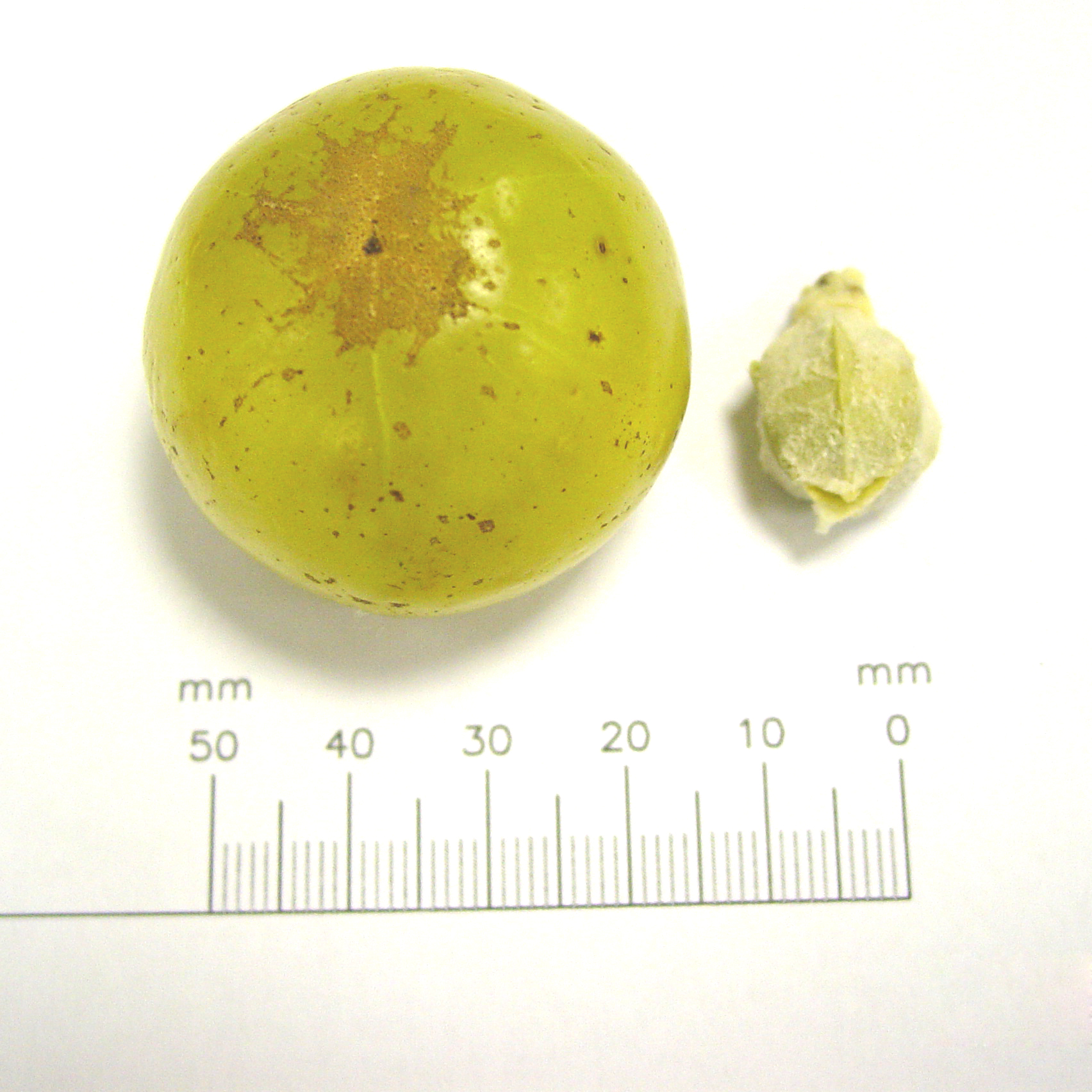 നെല്ലിക്ക - നെല്ലി താളിനു വേണ്ടി